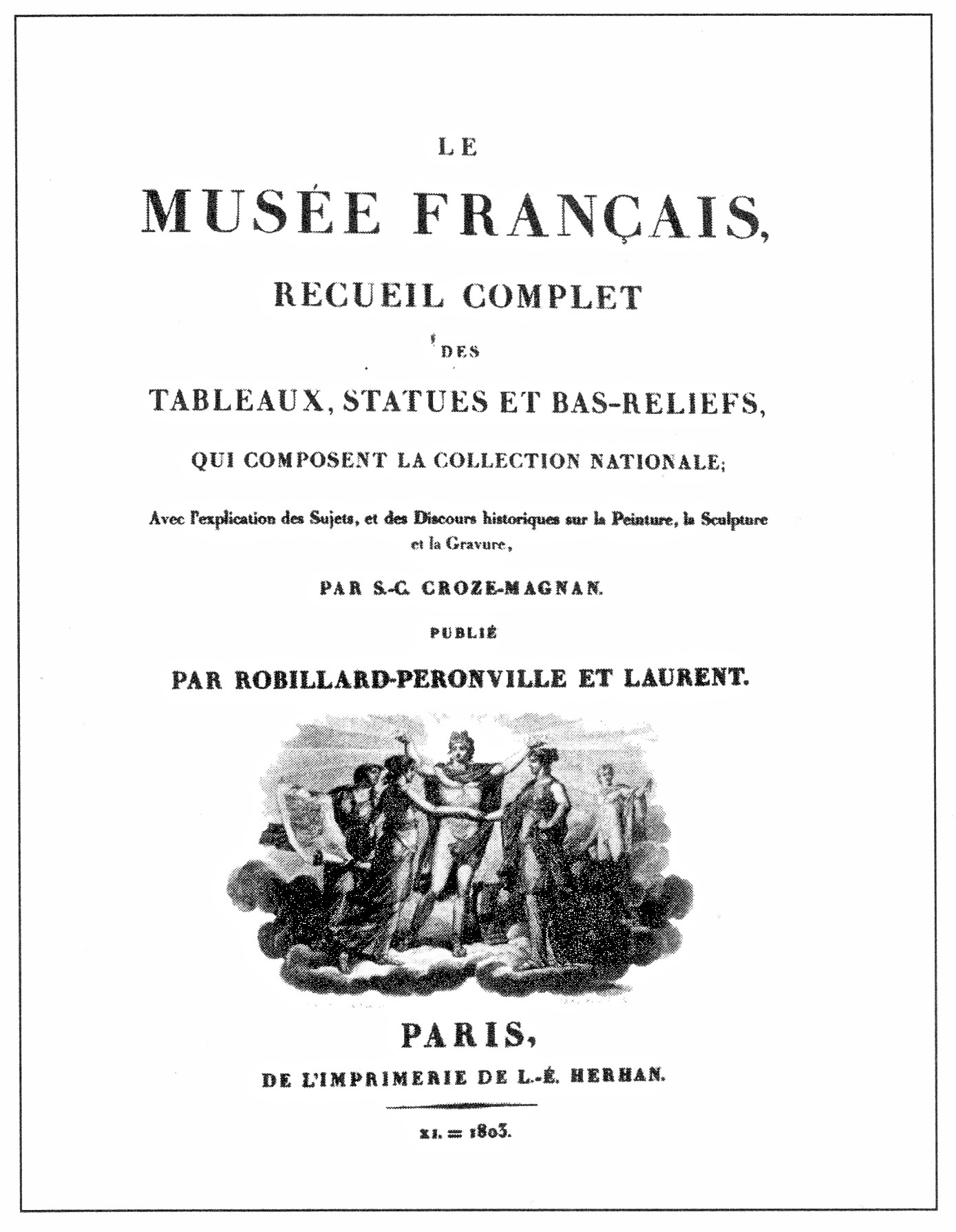 Simon-Célestin Croze-Magnan; Louis-Nicolas-Joseph Robillard-Péronville (Herausgeber); Pierre Laurent (Herausgeber): Le Musée Français. Recueil complet des Tableaux, Statues et Bas-reliefs, qui composent la collection nationale, Band 1, Paris 1803, Titelblatt.